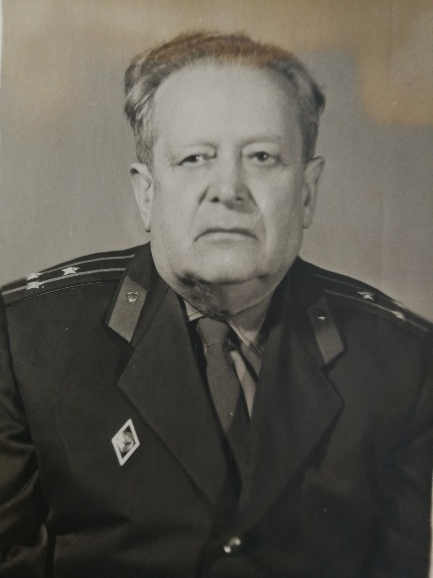 Восстановлен в правах